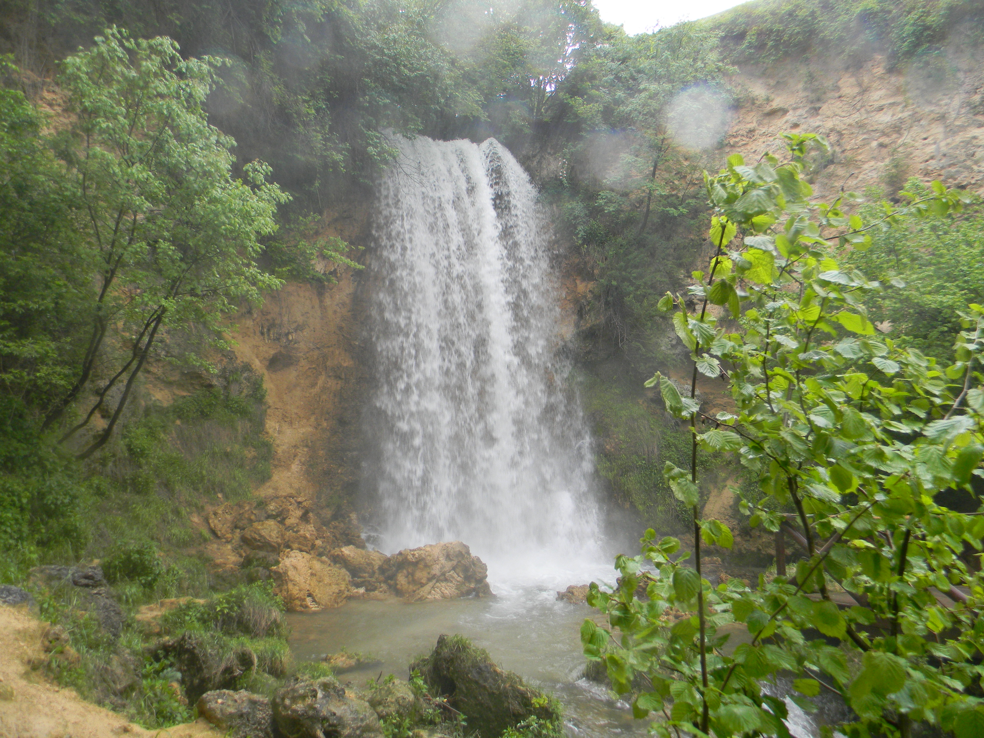 Ово је фотографија заштићеног природног добра у Србији под шифром: СП162The waterfall Veliki Buk (Lisine), Beljanica This is a a photo of a natural area in Serbia with ID: СП162The waterfall Veliki Buk (Lisine), Beljanica